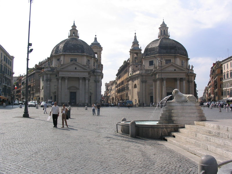 Roma, Piazza del Popolo: vista sulle chiese di Santa Maria dei Miracoli e Santa Maria in Montesanto.